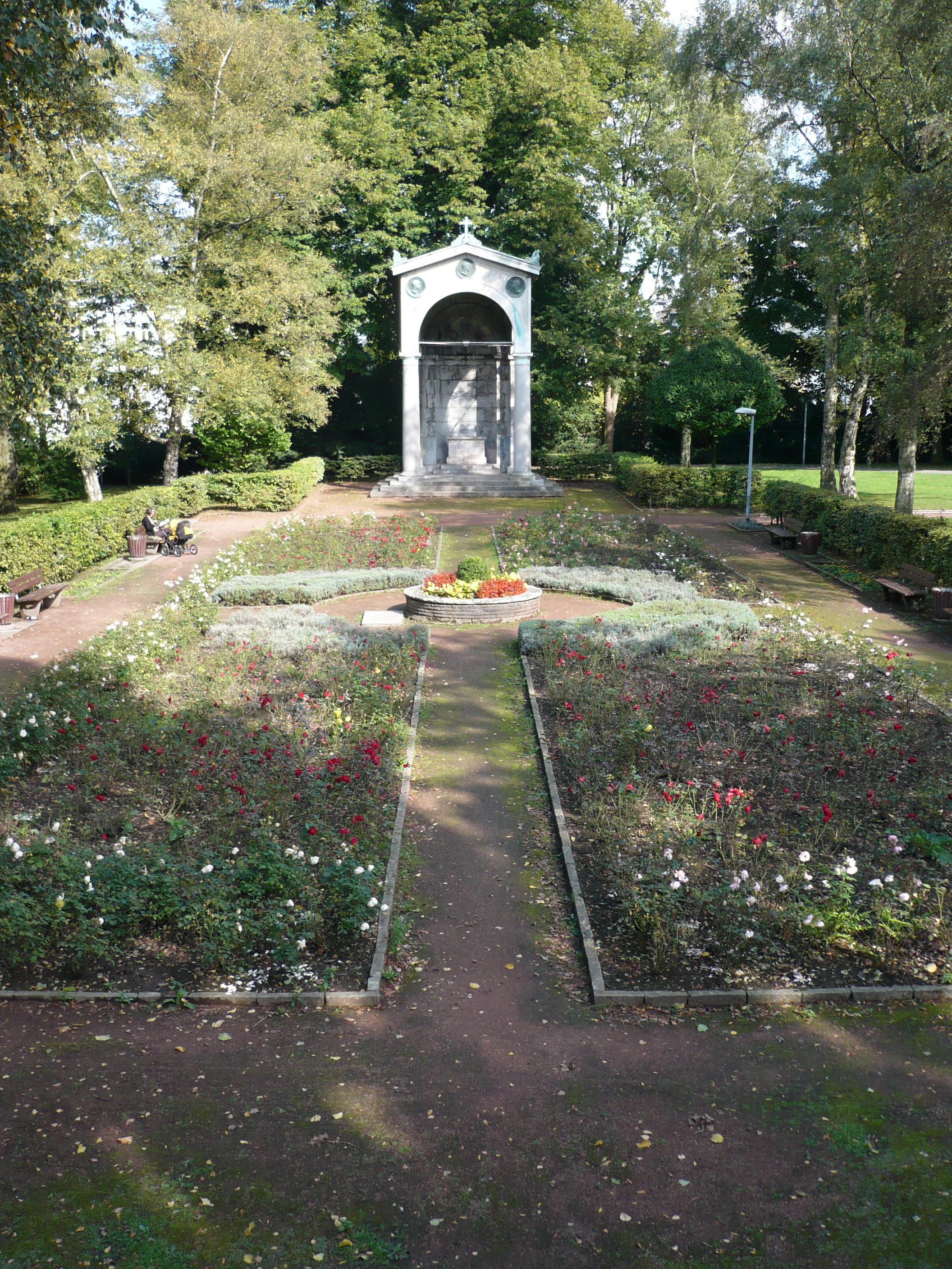 Aachener Stadtgarten (Farwickpark), Kongreßdenkmal im dorigen Rosengarten zu Erinnerung an den Monarchenkongreß 1818 in Aachen